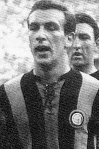 Milano, stadio San Siro, 13 settembre 1959. L'attaccante nerazzurro Antonio Valentín Angelillo esce dal campo all'intervallo della finale di Coppa Italia 1958-59 tra Inter e Juventus (1-4).